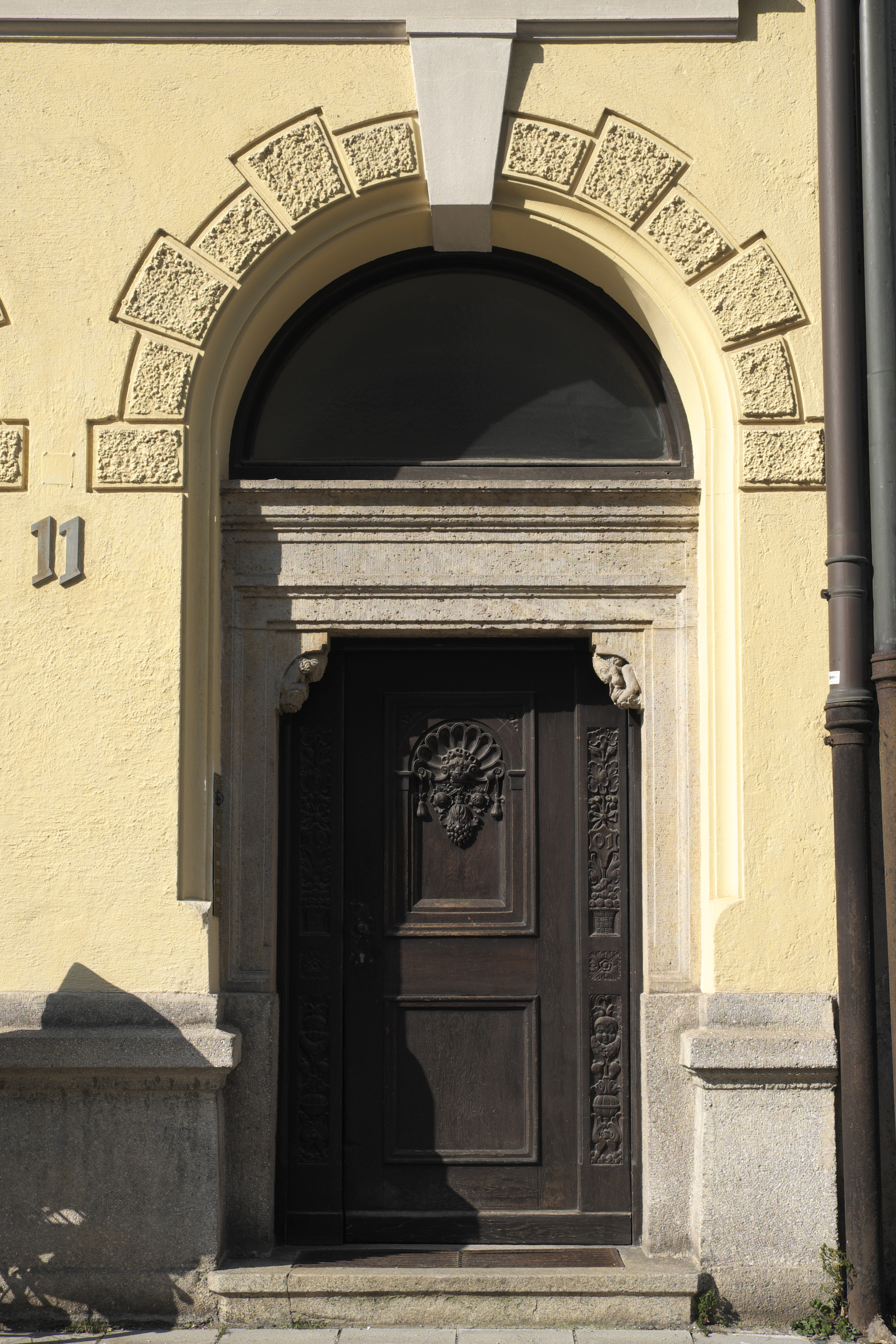 Wohnhaus in der Richard-Wagner-Straße 11 im Stadtbezirk Maxvorstadt in München (Bayern/Deutschland), Haustür